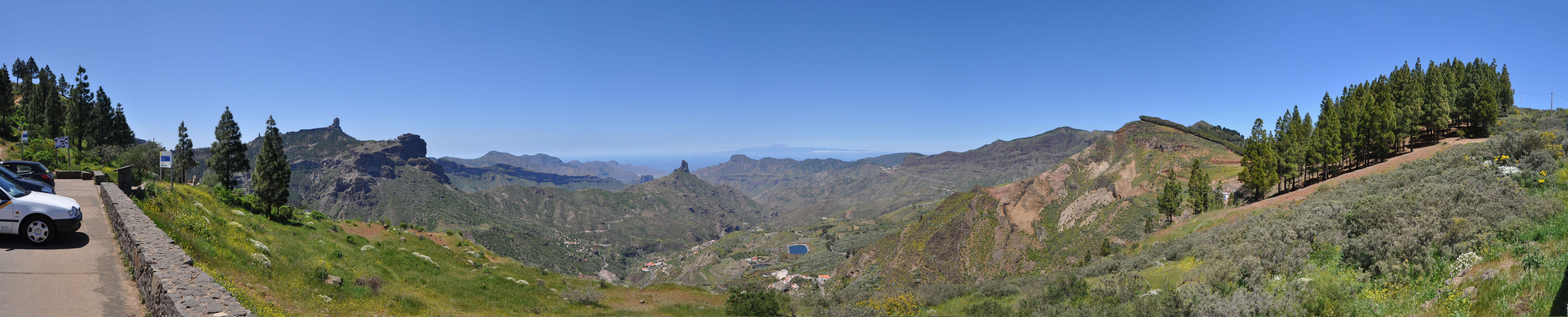 Paisaje de la isla de Gran Canaria, con el Roque Nublo a la izquierda, el Roque Bentayga en el centro, y la isla de Tenerife y el Teide al fondo.